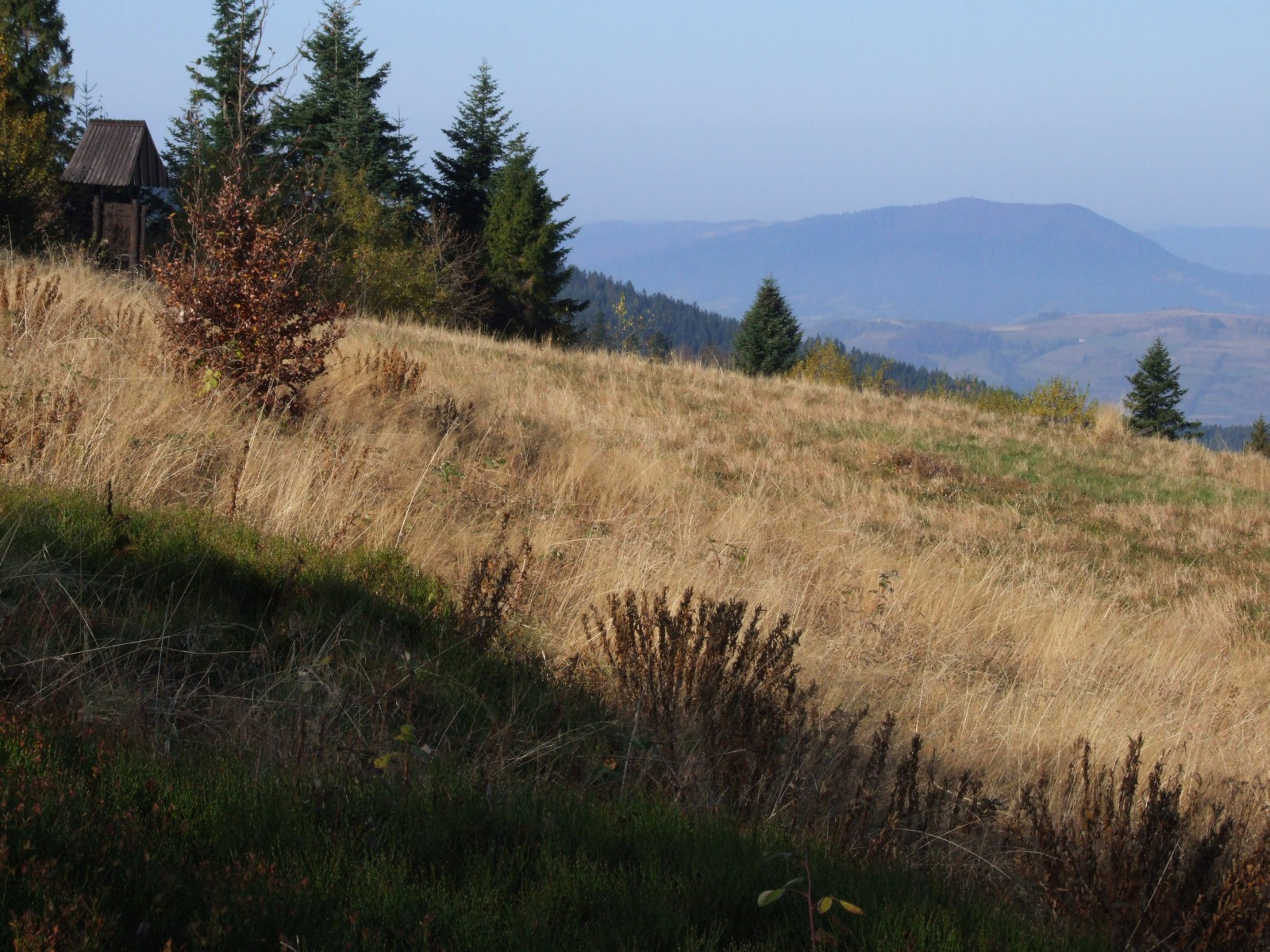 Polana Kopa w Gorcach. W głębi Beskid Wyspowy